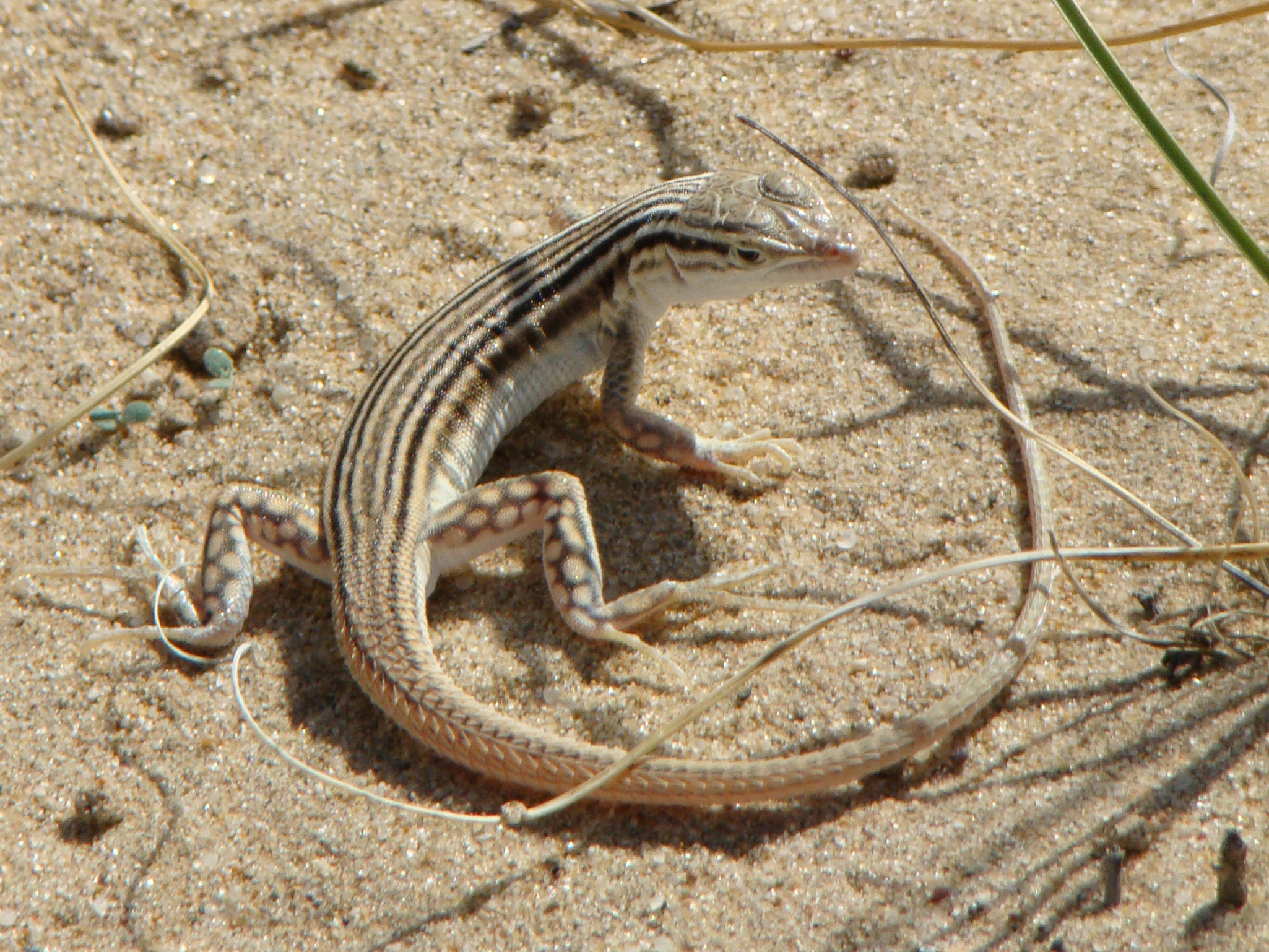 Линейчатая ящурка (Eremias lineolata). Окрестности города Байконур, левый берег Сырдарьи.